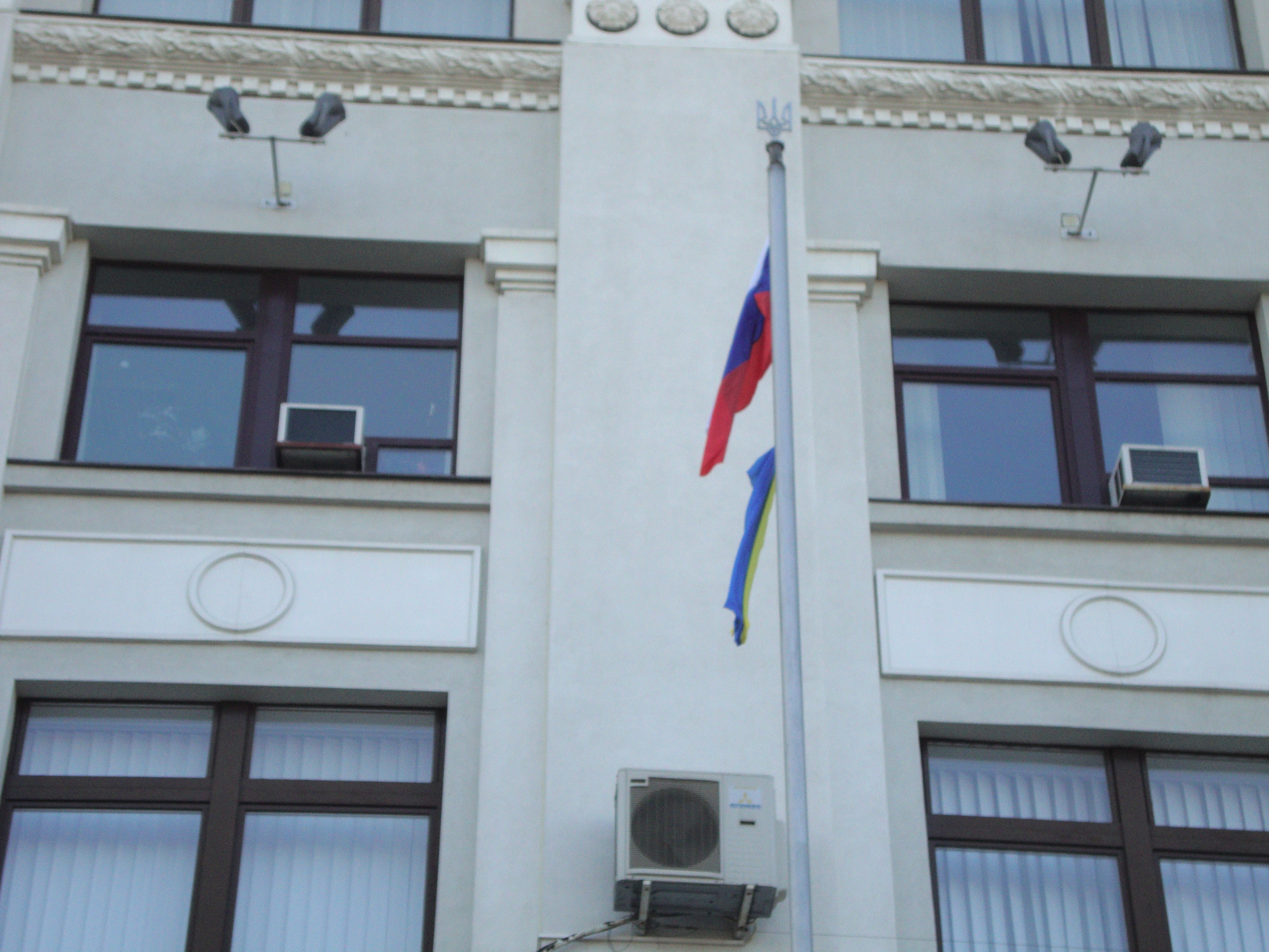 Російська весна у Луганську: піднятий прапор Росії